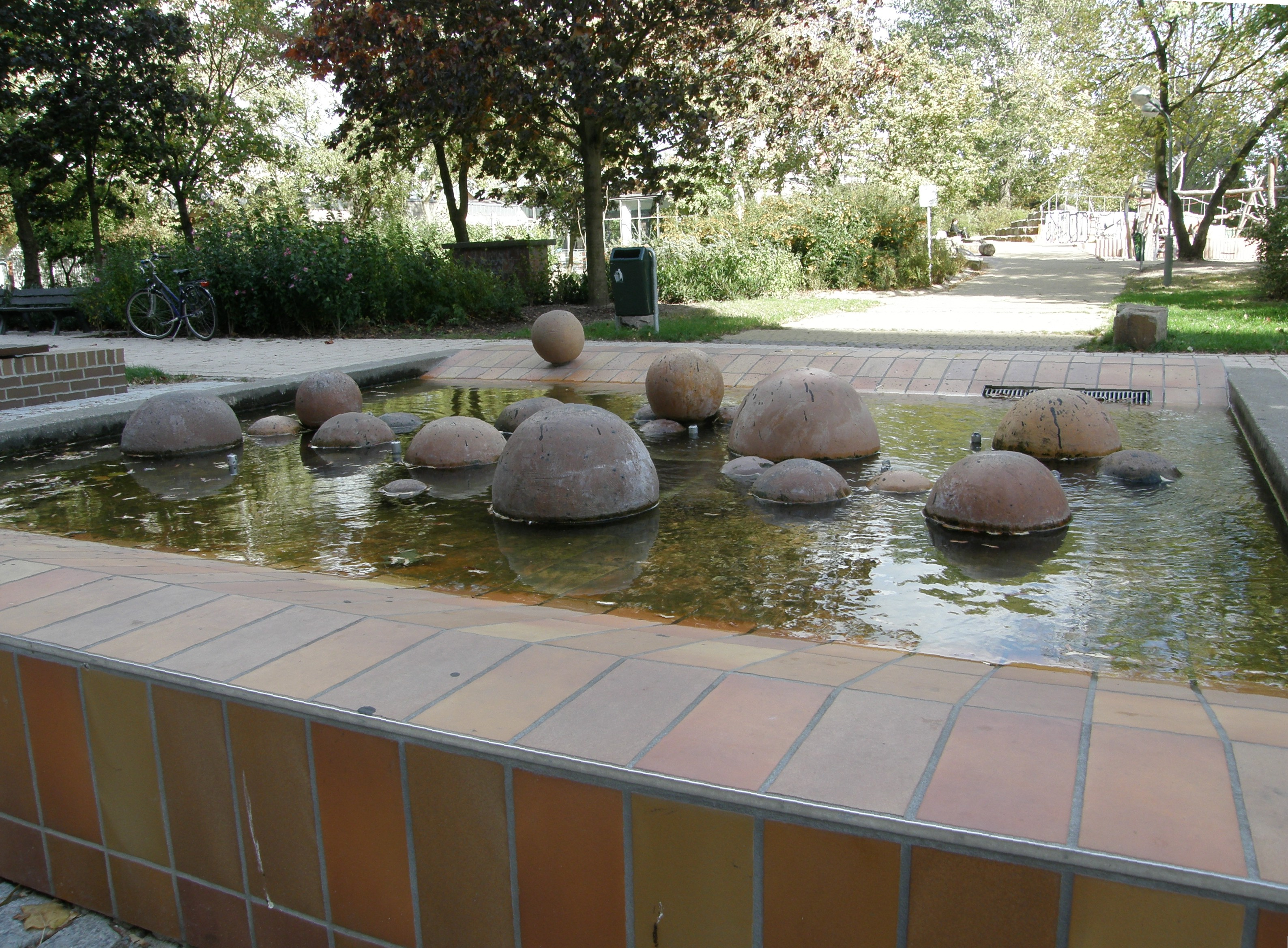 Kugelbrunnen am Anton-Saefkow-Platz